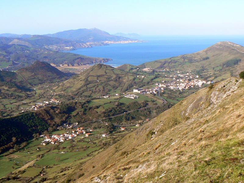 Zierbena, barrios de Valle (abajo a la izquierda), Kardeo (arriba a la izquierda) y La Cuesta (derecha)